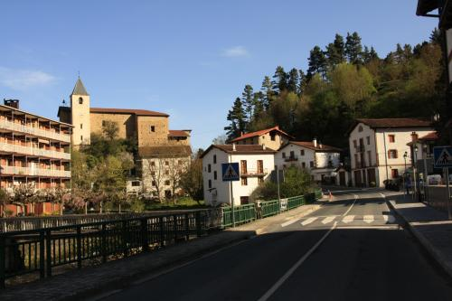 Ataungo San Gregorio auzoa. Gipuzkoa, Euskal Herria.